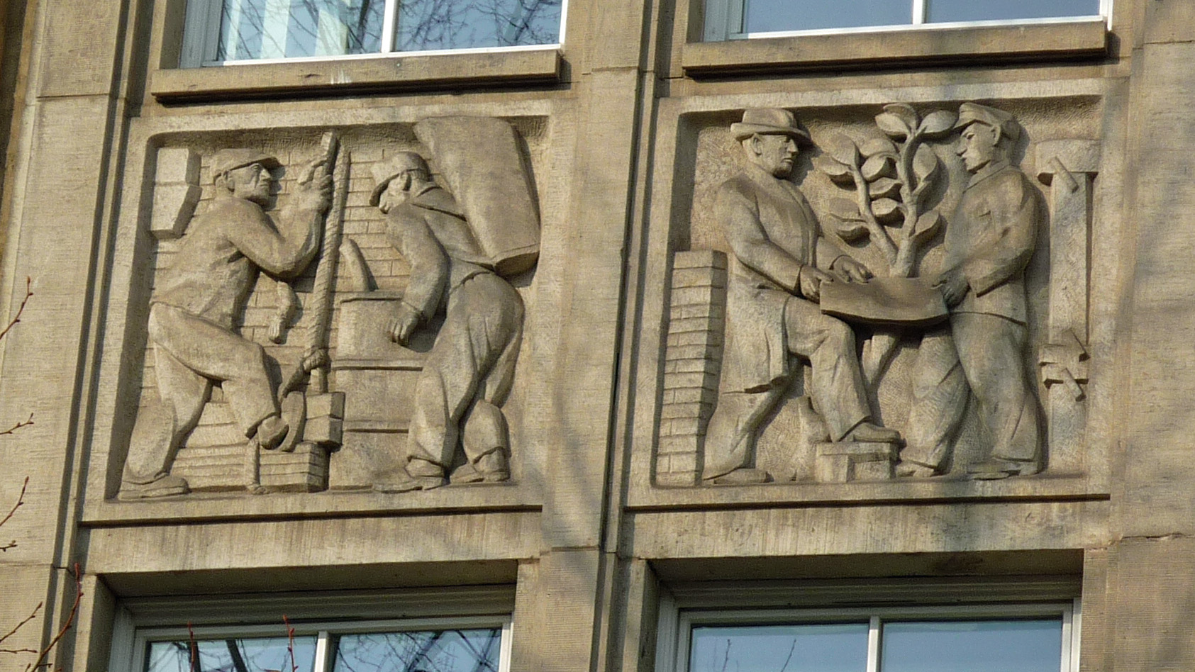 Reliefs "Leben auf dem Bau" am Studentenwohnheim, Fritz-Löffler-Str. 18 (von Rudolf Wittig)